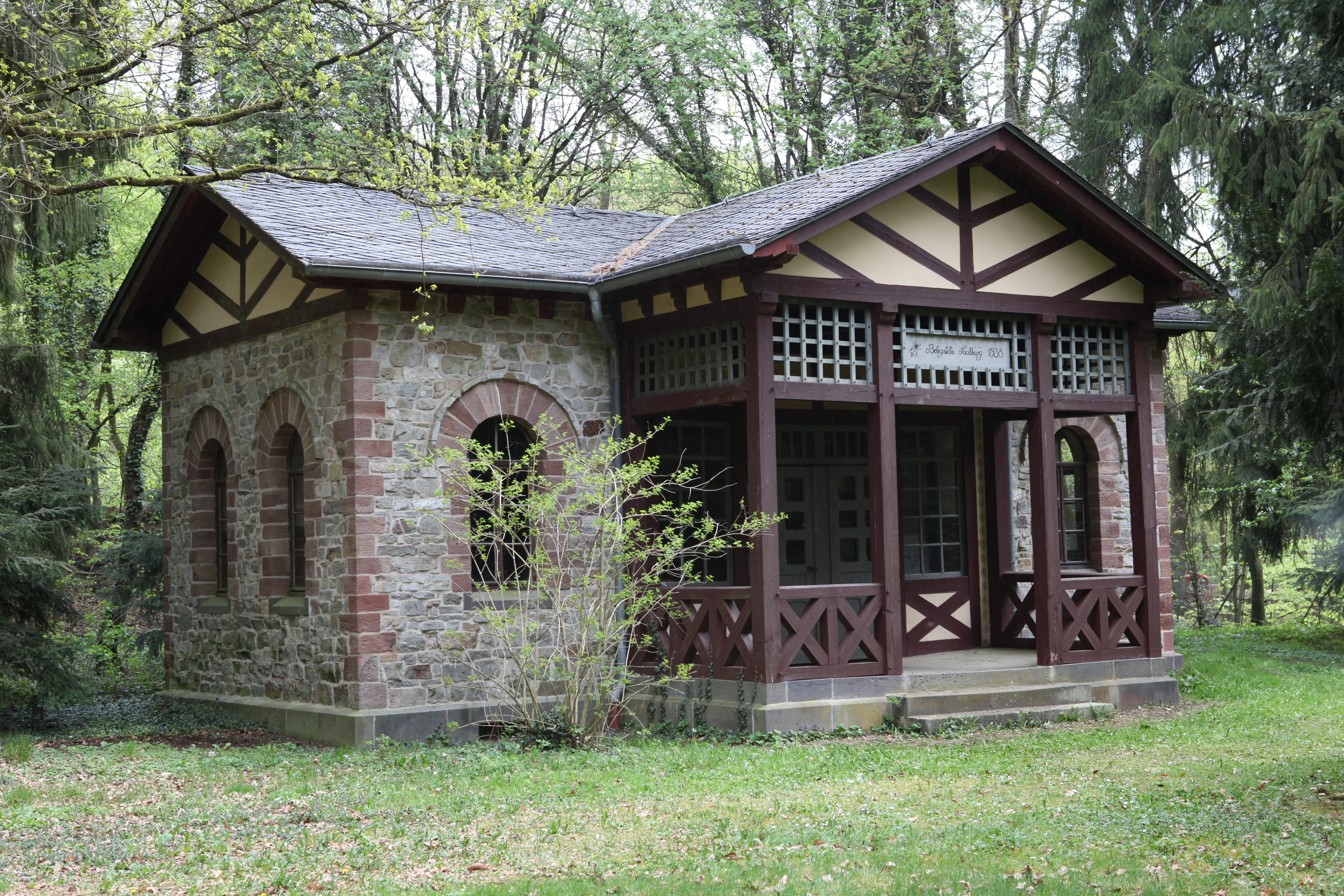 Bahnhof der elektr. Straßenbahn an der Saalburg, gebaut 1900, Architekt war Louis Jacobi († 1910)